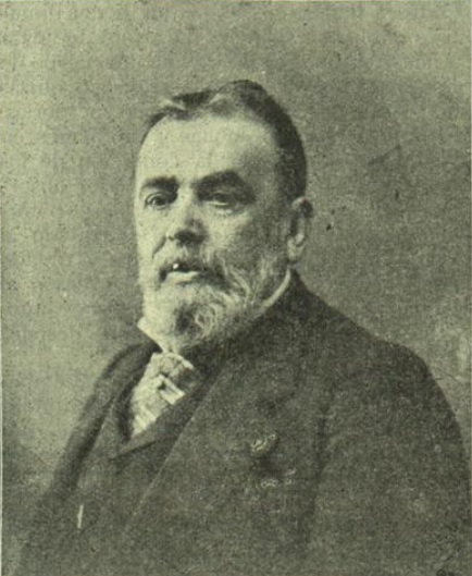 José María Celleruelo, ministro de Gracia y Justicia.